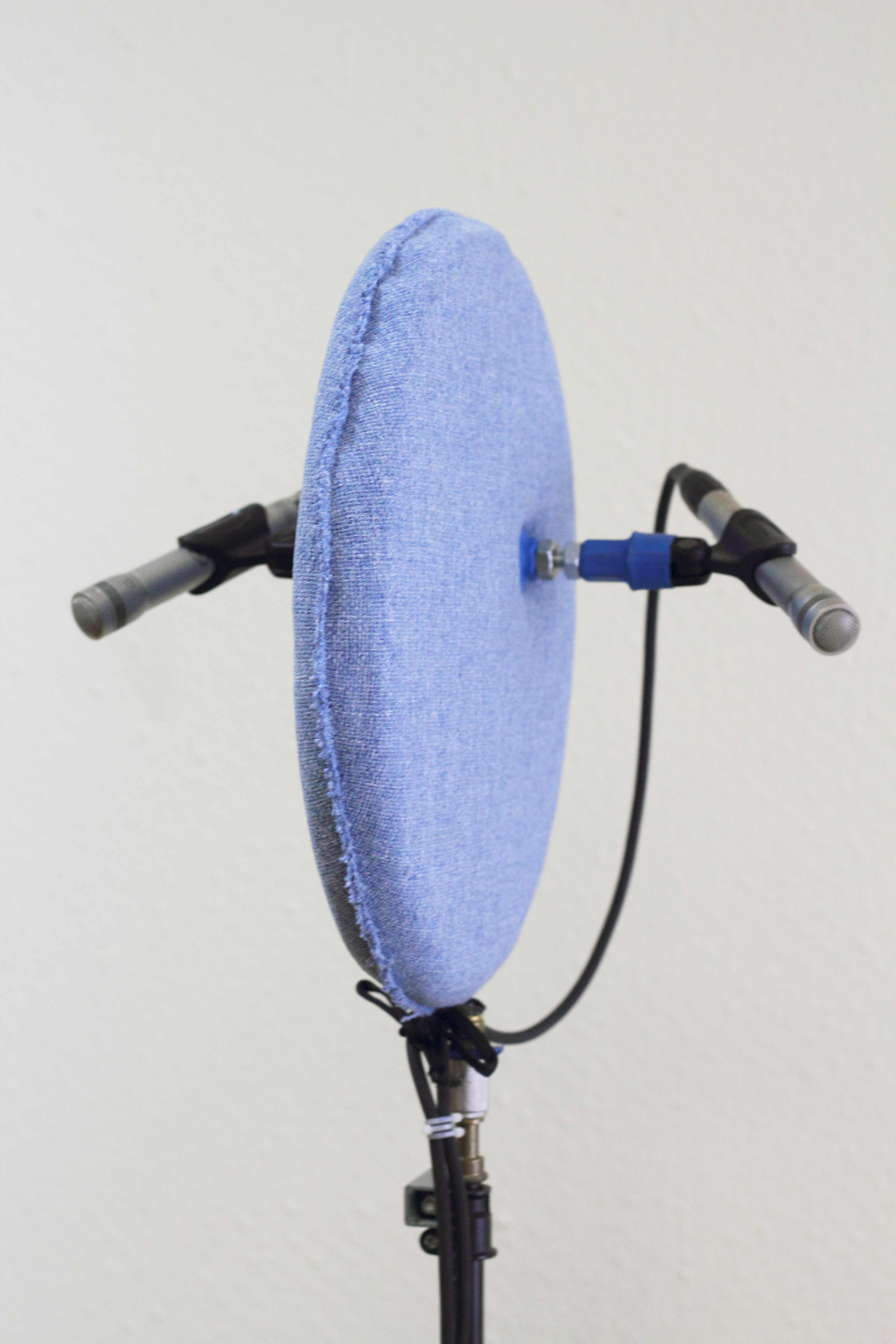 Действующая модель